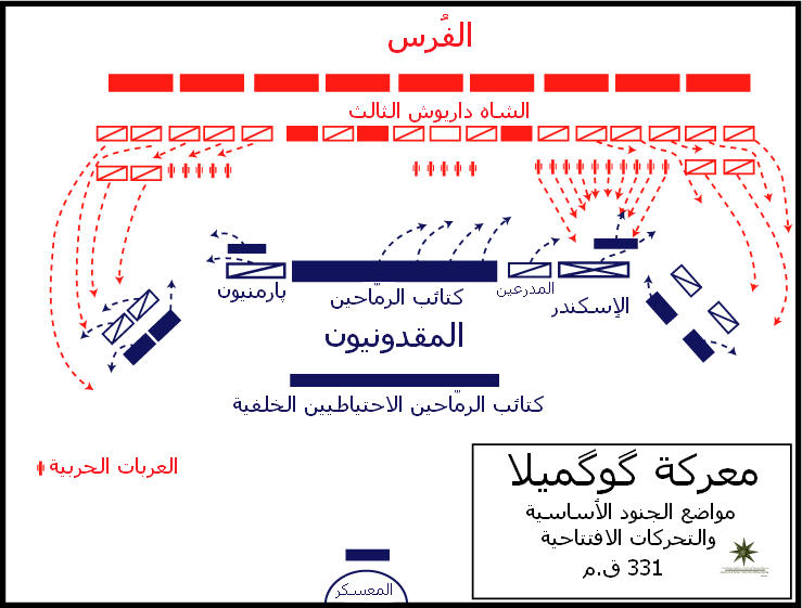 مخطط معركة گوگميلا بين الإسكندر الأكبر والفرس.